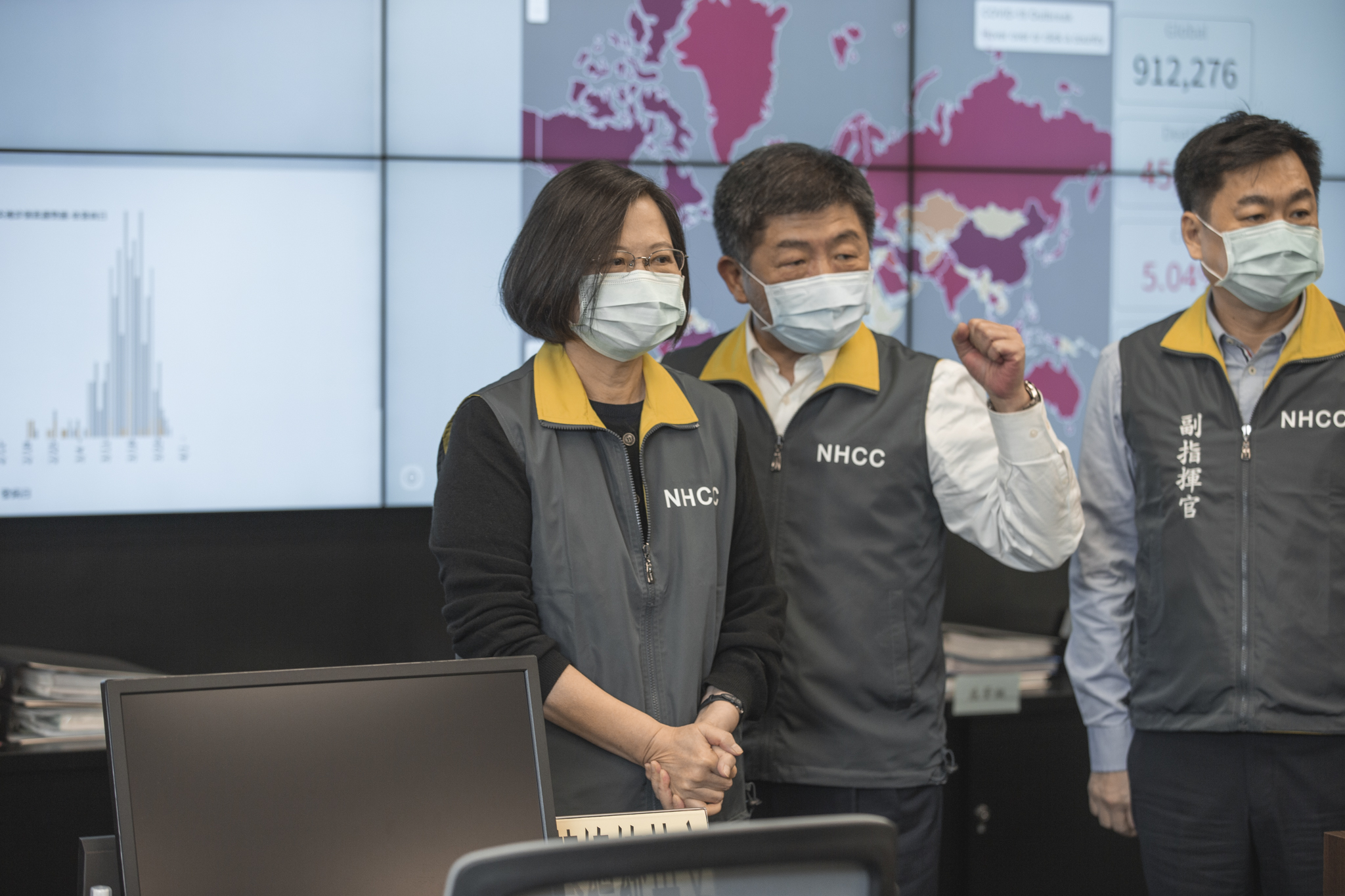 04.02 總統視察「中央流行疫情指揮中心」